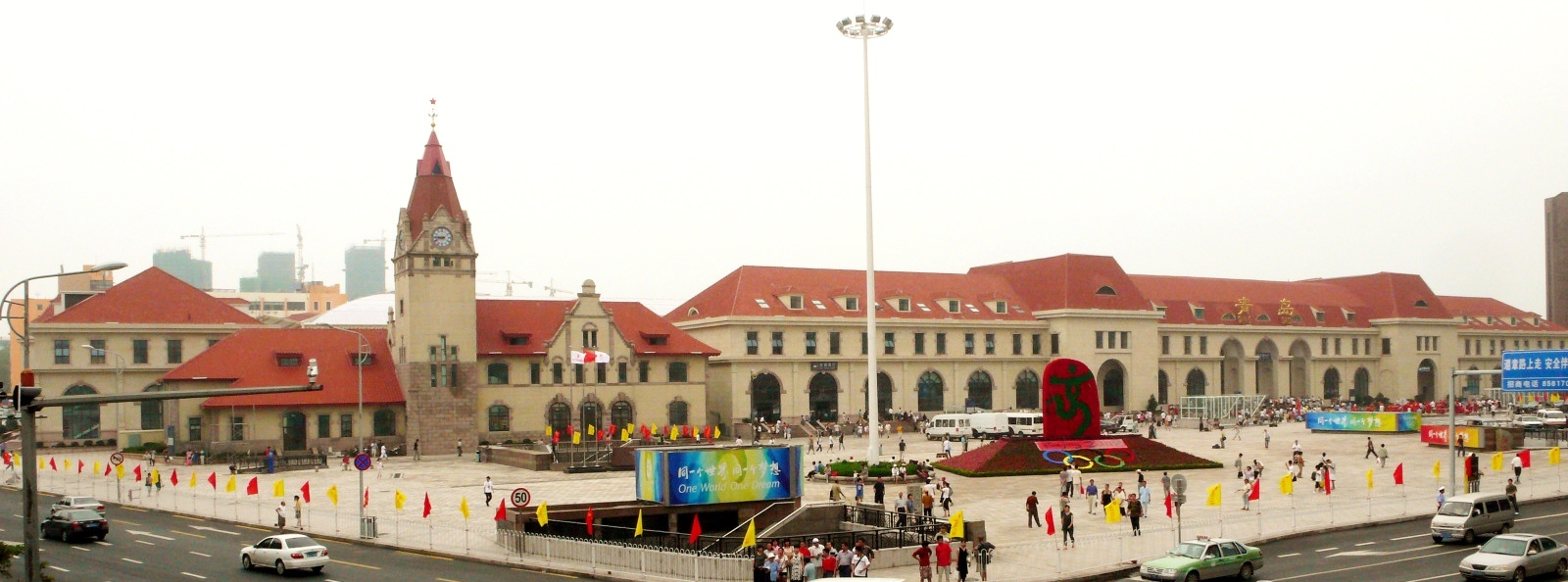 青岛站东侧全景